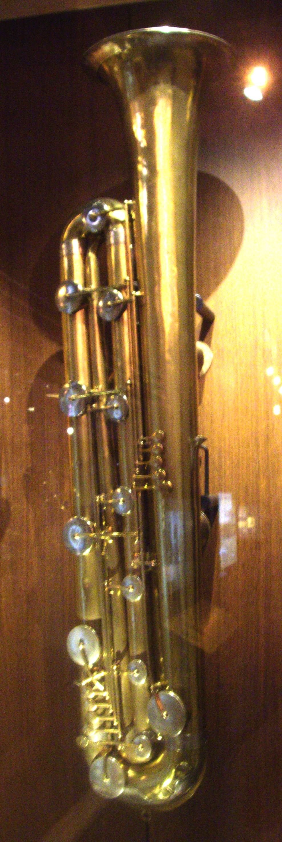 Tritonikon